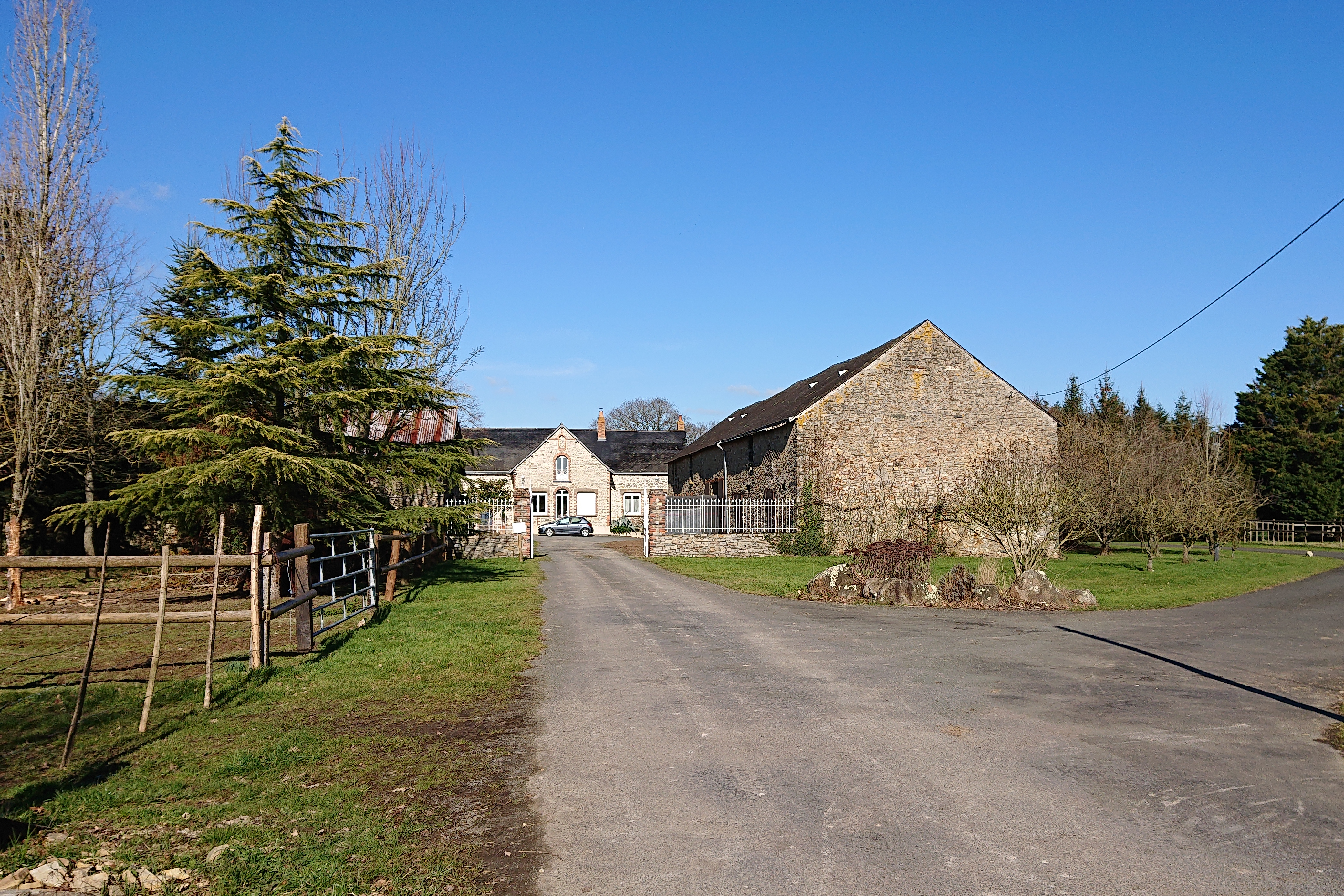 Hameau des Cohardières, Châteaubriant, France.